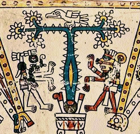 Page 1 du Codex Fejéváry-Mayer. Les 4 points cardinaux aztèques et les 4 signes "porteurs d’années". Ceiba pentandra. Foundation for the Advancement of Mesoamercan Studies, Inc. (FAMSI).